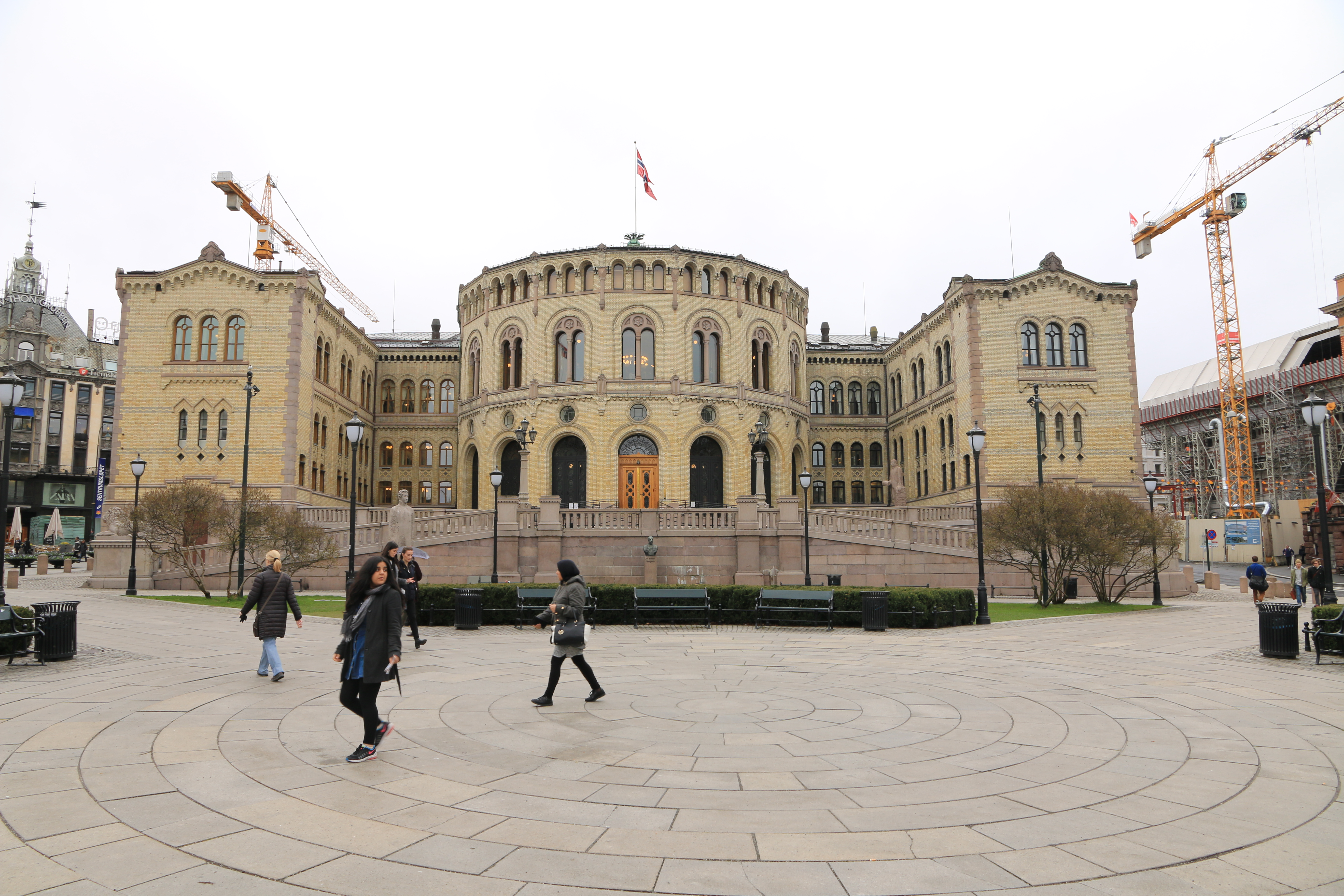 Stortinget Oslo.